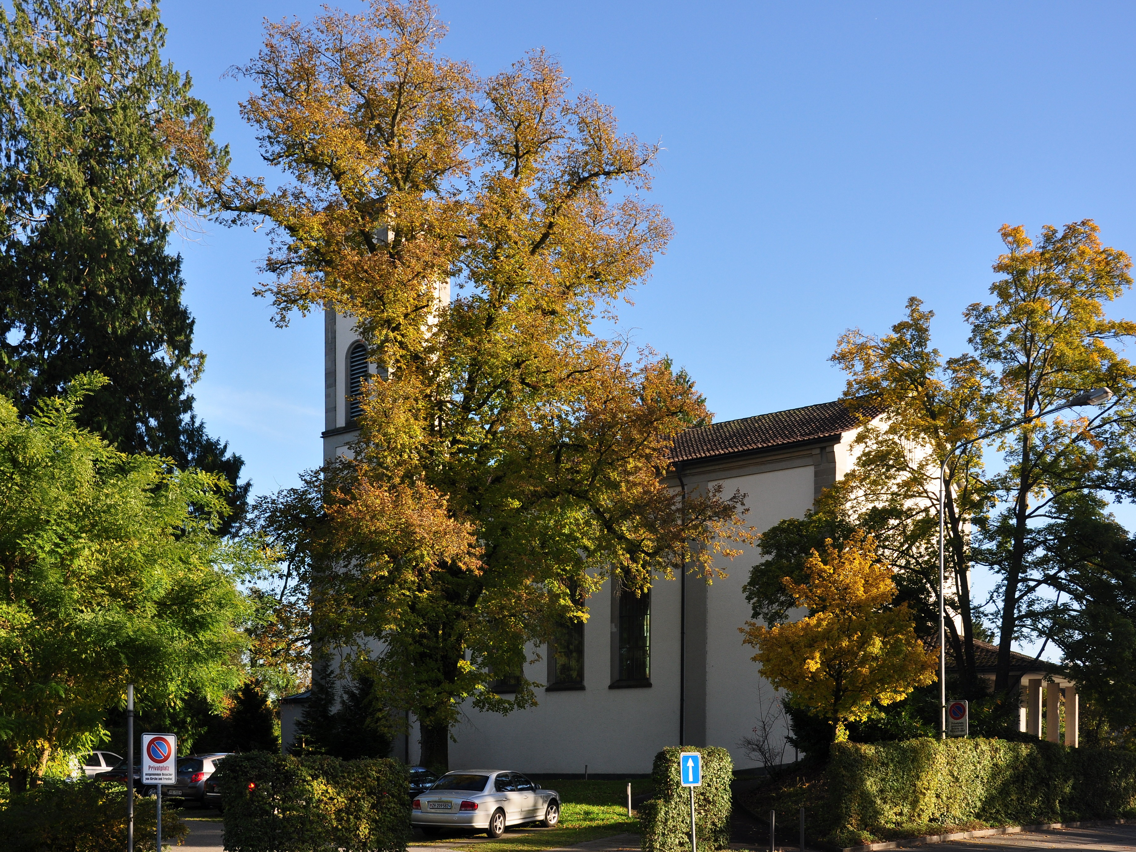 Reformierte Kirche in Rapperswil (Switzerland)